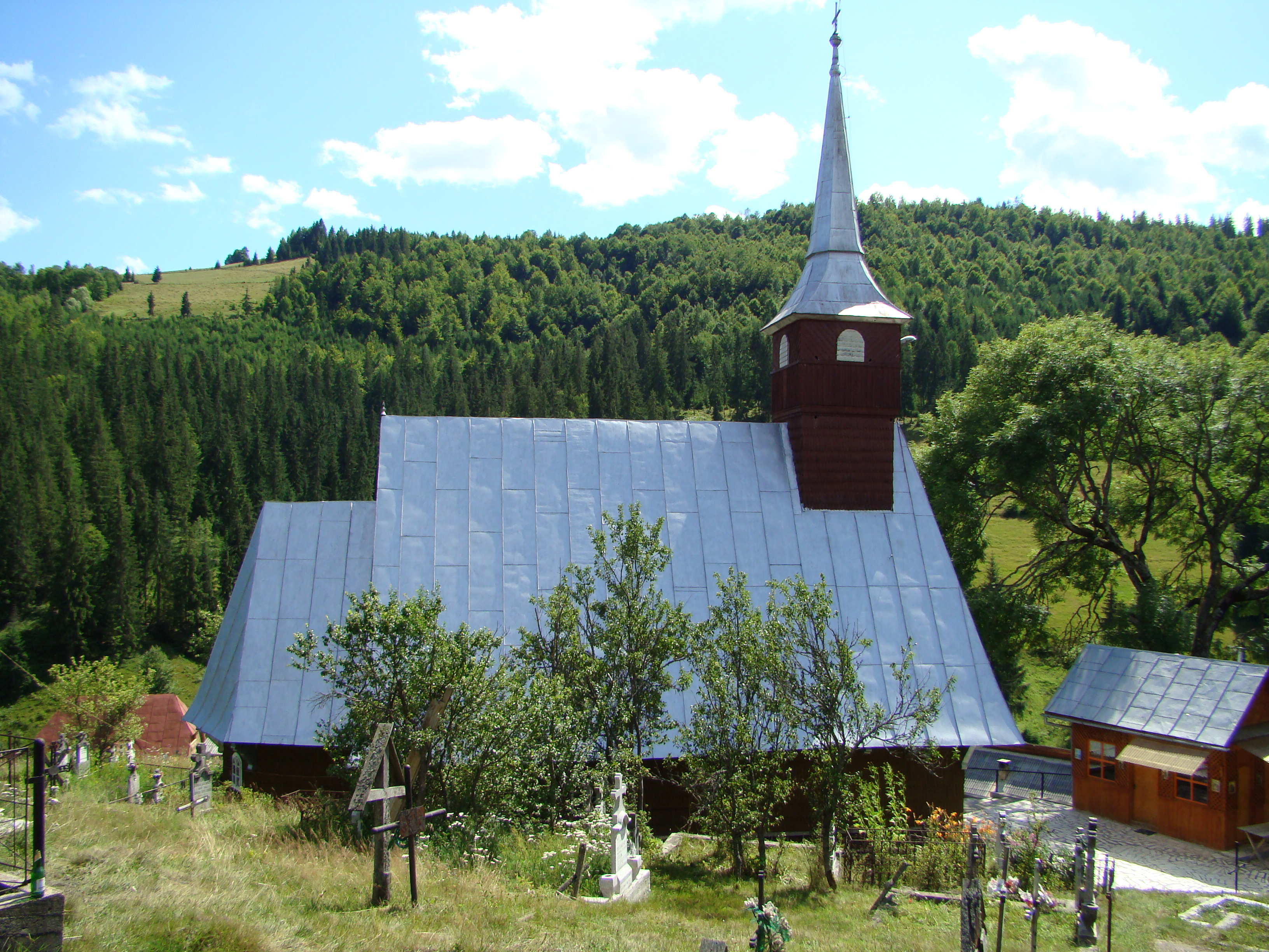 Biserica de lemn din Lăzești(Vadu Moților)